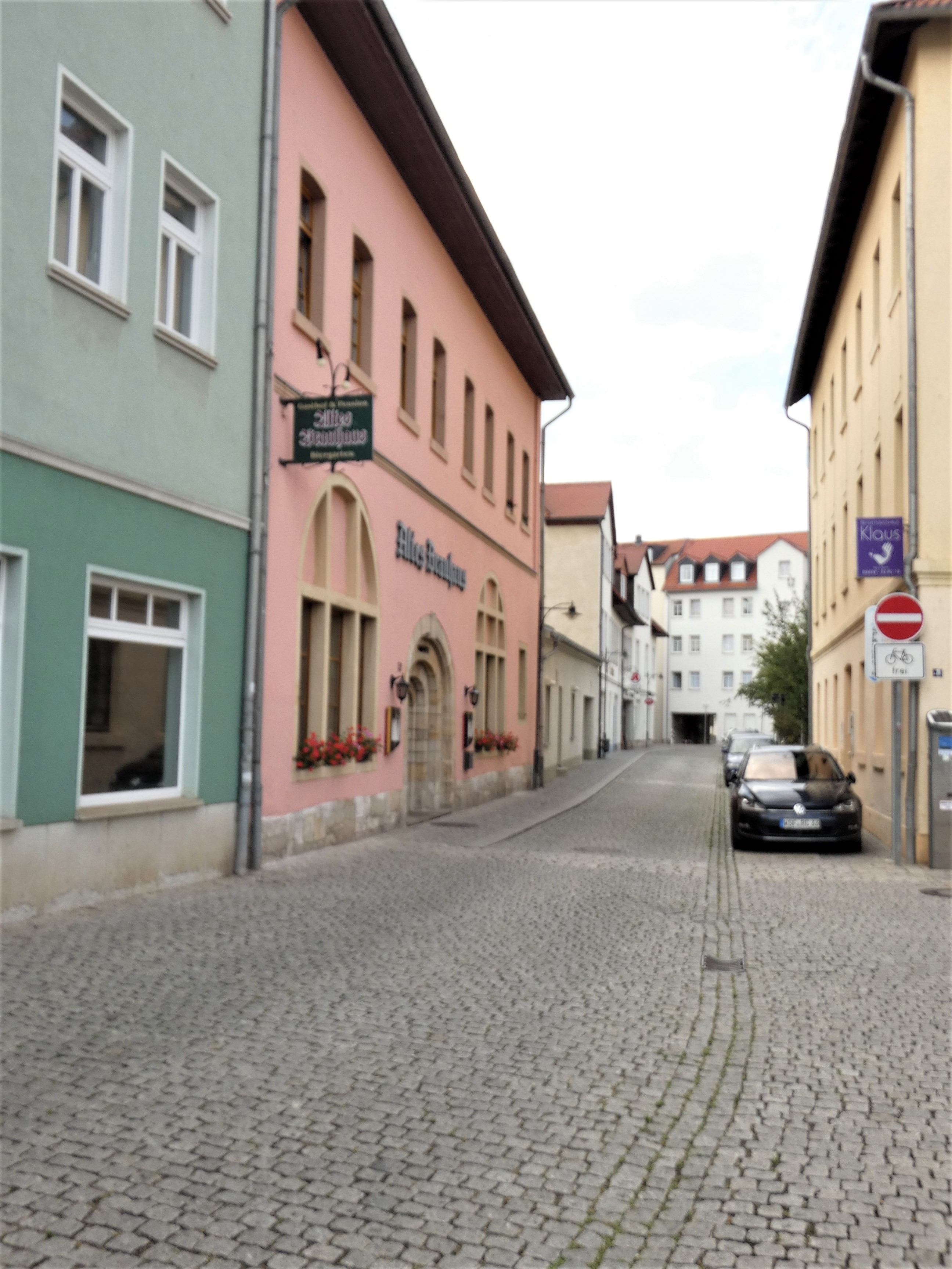 Fischgasse in Weißenfels